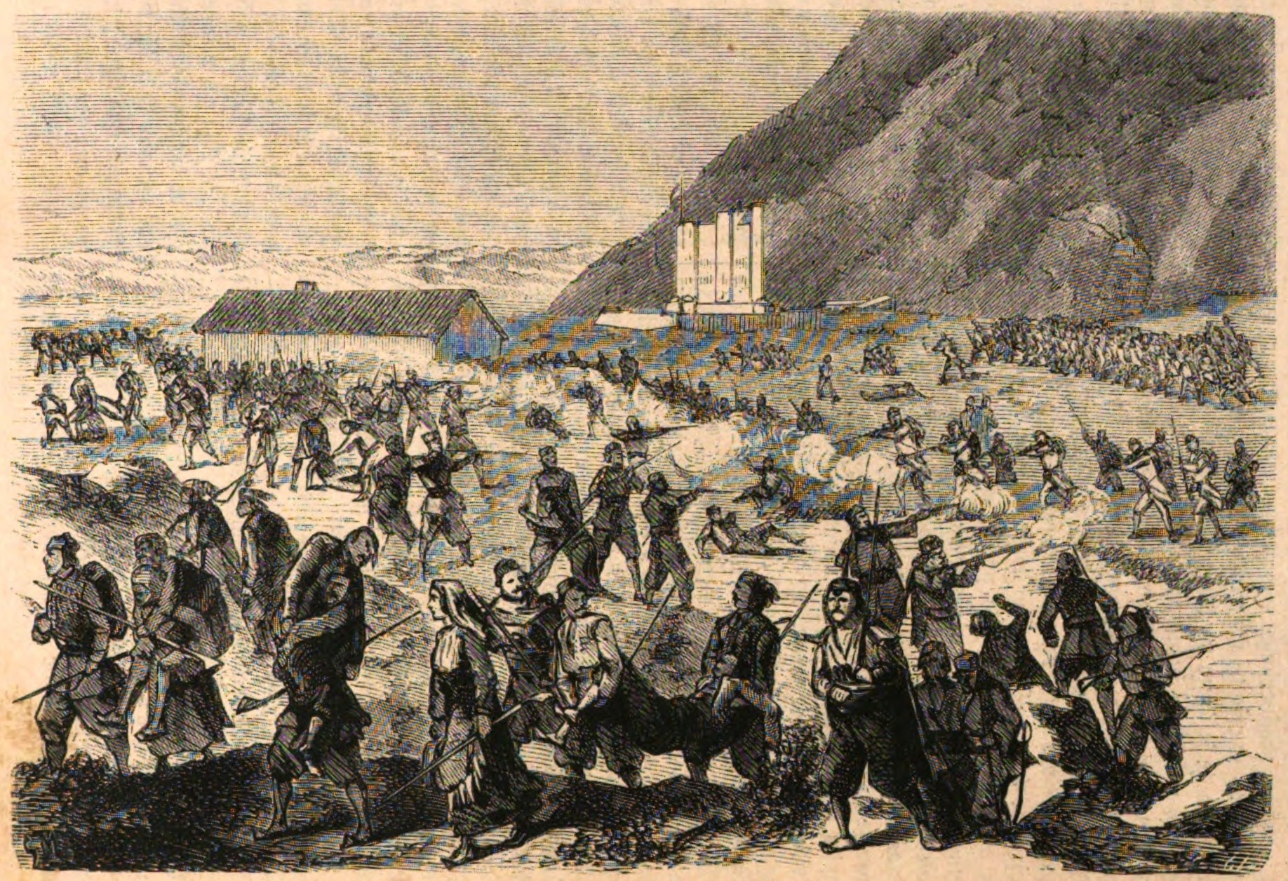 Insurrección de Dalmacia, combate de la Trinidad, Balcanes 1869. Levantamiento campesino en Krivosije